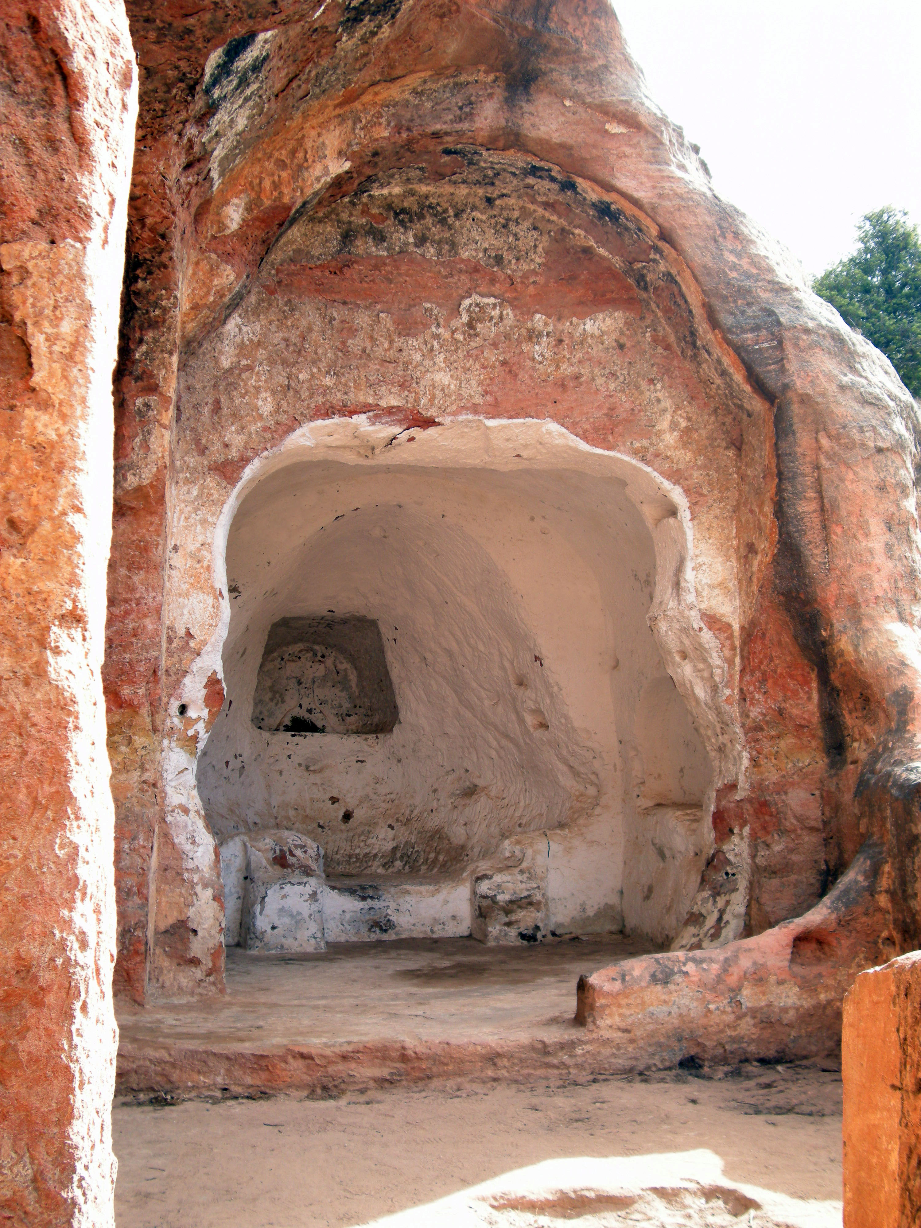 Entrada al Eremitorio de Argés, Valle de Manzanedo, Burgos